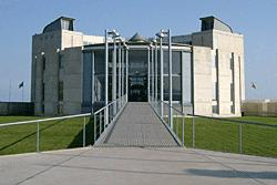 Badalona Centre Internacional de Negocis (BCIN).